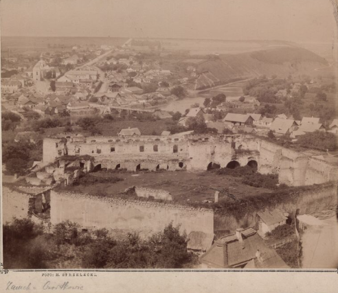 Чортків, старий костел і замок, бл. 1865